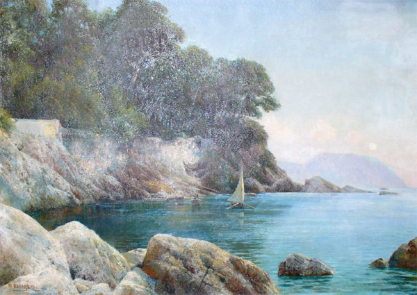 Вельц Иван Августович (1866-1926) Парусник в бухте. 1914 холст, масло, 52х75. Инв. Ж-532 В левом нижнем углу черным авторская подпись «И Вельцъ 1914